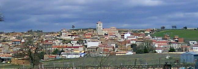 Vista panorámica de Fuentelisendo en abril de 2010.